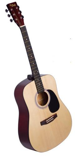 木吉他